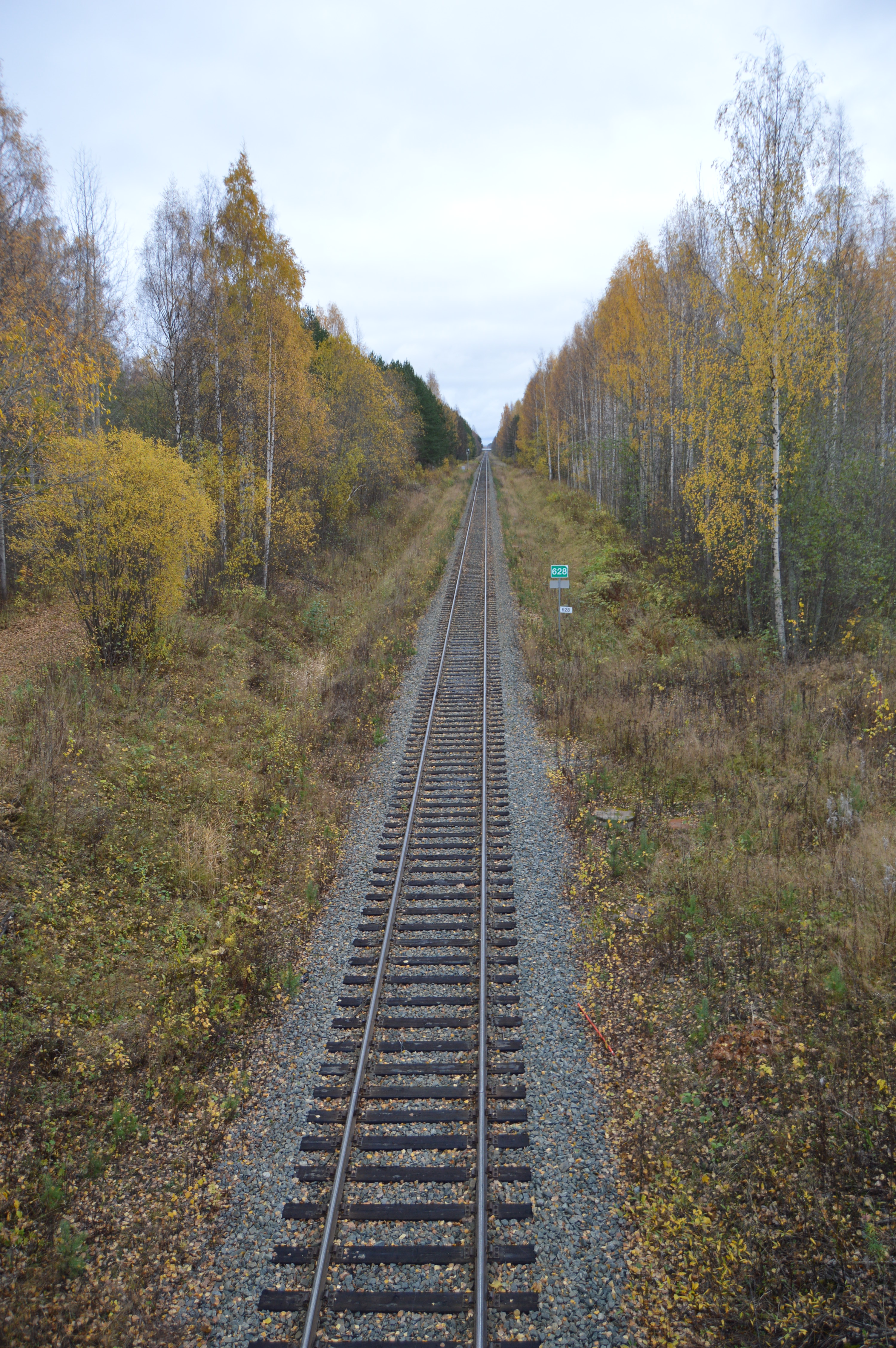 Ilomantsin rata kuvattuna Joensuun Lappeenrannantien sillalta itää kohti.